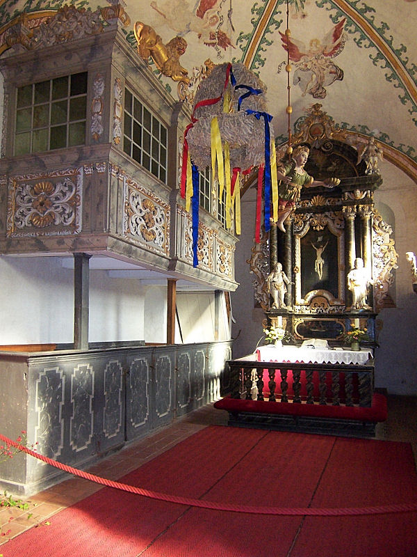 Kirche in Rerik, Mecklenburg-Vorpommern